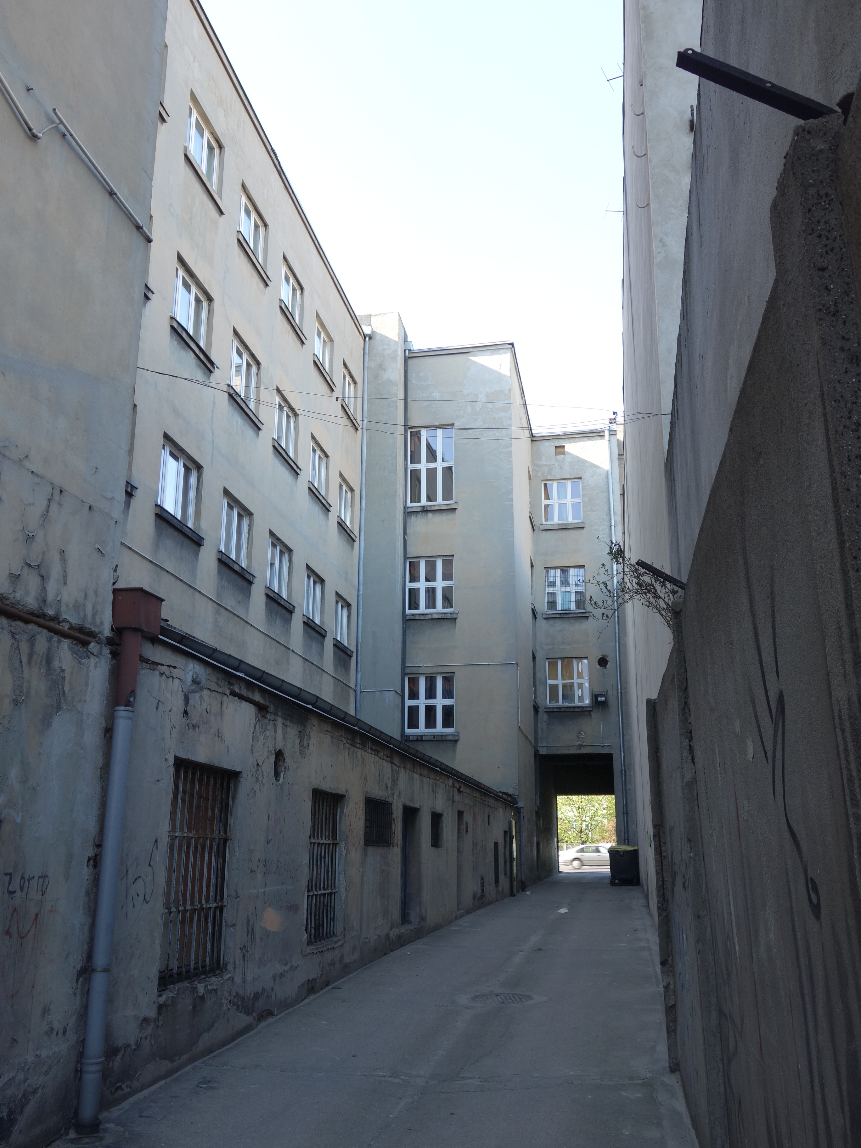 Grundschule (Szkoła Podstawowa) Nr. 4 der Stadt Łódź in der heutigen Aleja Józefa Piłsudskiego 101 (Piłsudski-Allee); das Gebäude (links, hier der Blick durch die Einfahrt auf die Piłsudski-Allee) beherbergte während der deutschen Besatzung von 1941 bis 1944 die Günther-Prien-Schule (anfangs als Staatliche Oberschule für Jungen II bezeichnet); die Adresse lautete damals Ostlandstraße 191.